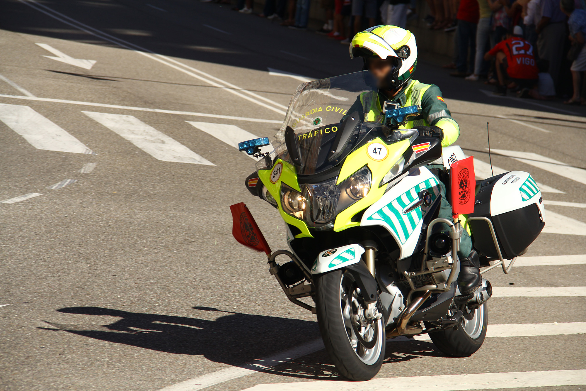 Moto de la Guardia Civil en la Vuelta ciclista a España 2016 en Vigo.